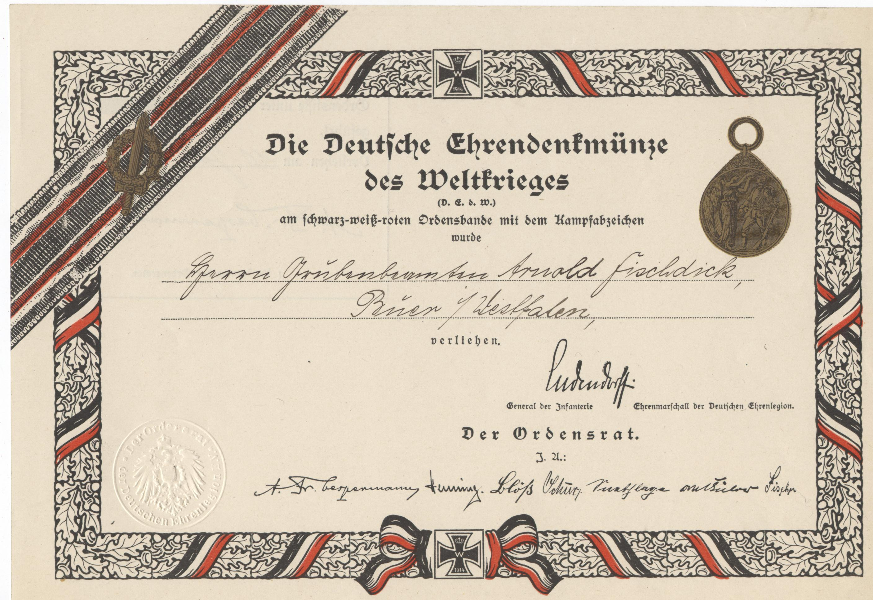 Verleihungsurkunde Deutsche Ehrendenkmünze des Weltkriegs, am schwarz-weiß-roten Ordensband mit Kampfabzeichen (Deutsche Ehrenlegion).